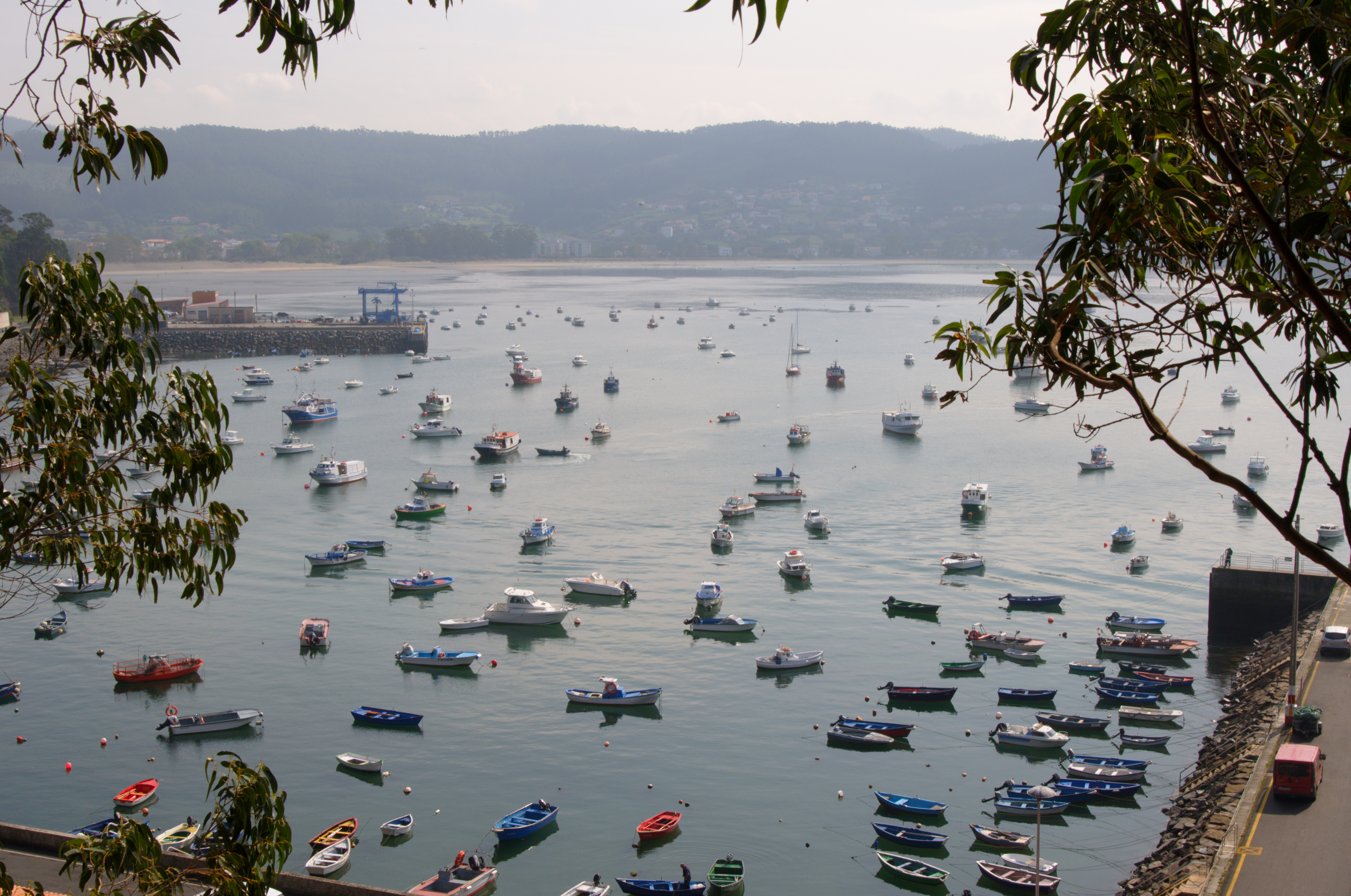 Hafen von Cedeira, Galicien